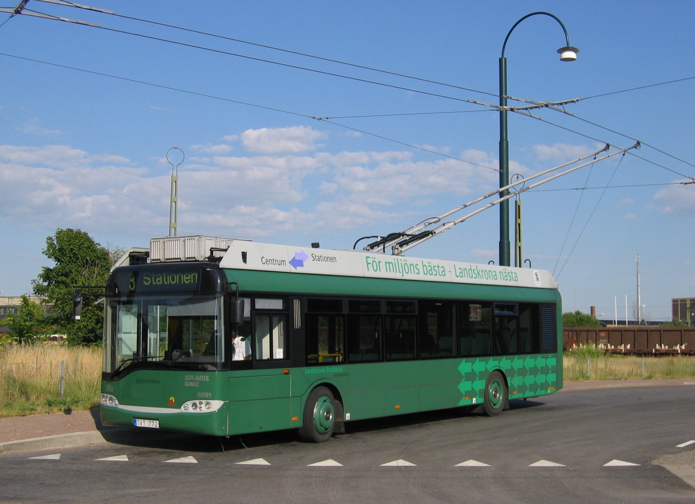 Landskrona är en av de få städer i Europa som har trådbussar. Trådbussar introducerades 2003 i Landskrona och kör resenärer mellan centrum och järnvägsstationen, som ligger i stadens utkant.